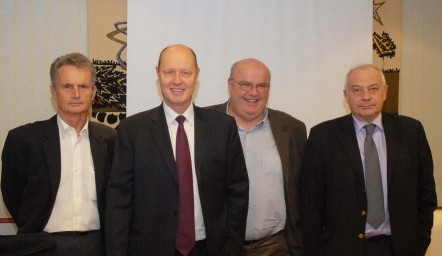 réunion UDN